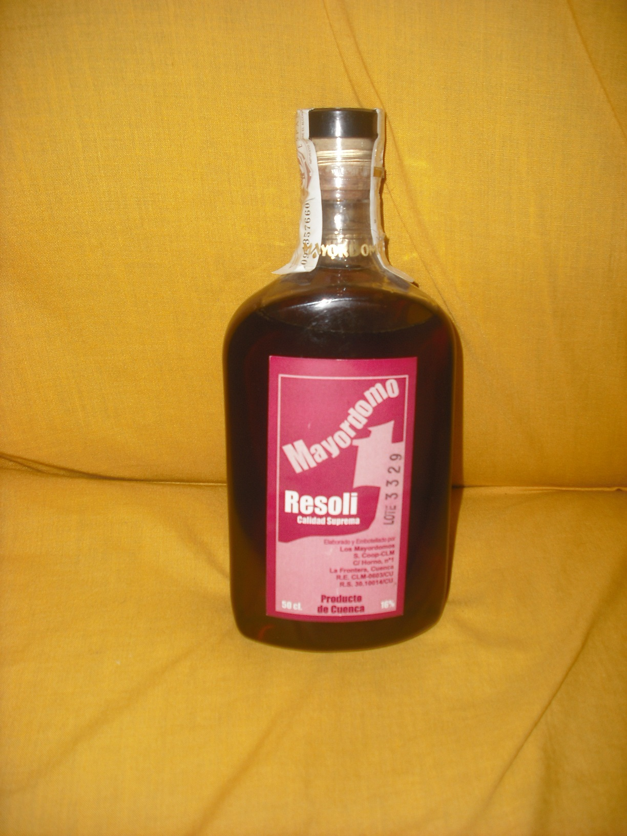 Botella de Resolí, producto de Cuenca, España.